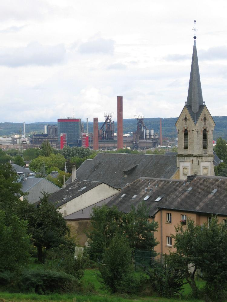 Vue iwwer Al-Bieles, mat am Hannergronn d' Frichë vun Esch-Belval. Photo vum Pear 08:11, 30 August 2006 (UTC) 29.08.2006. Kategorie:Gemeng Suessem